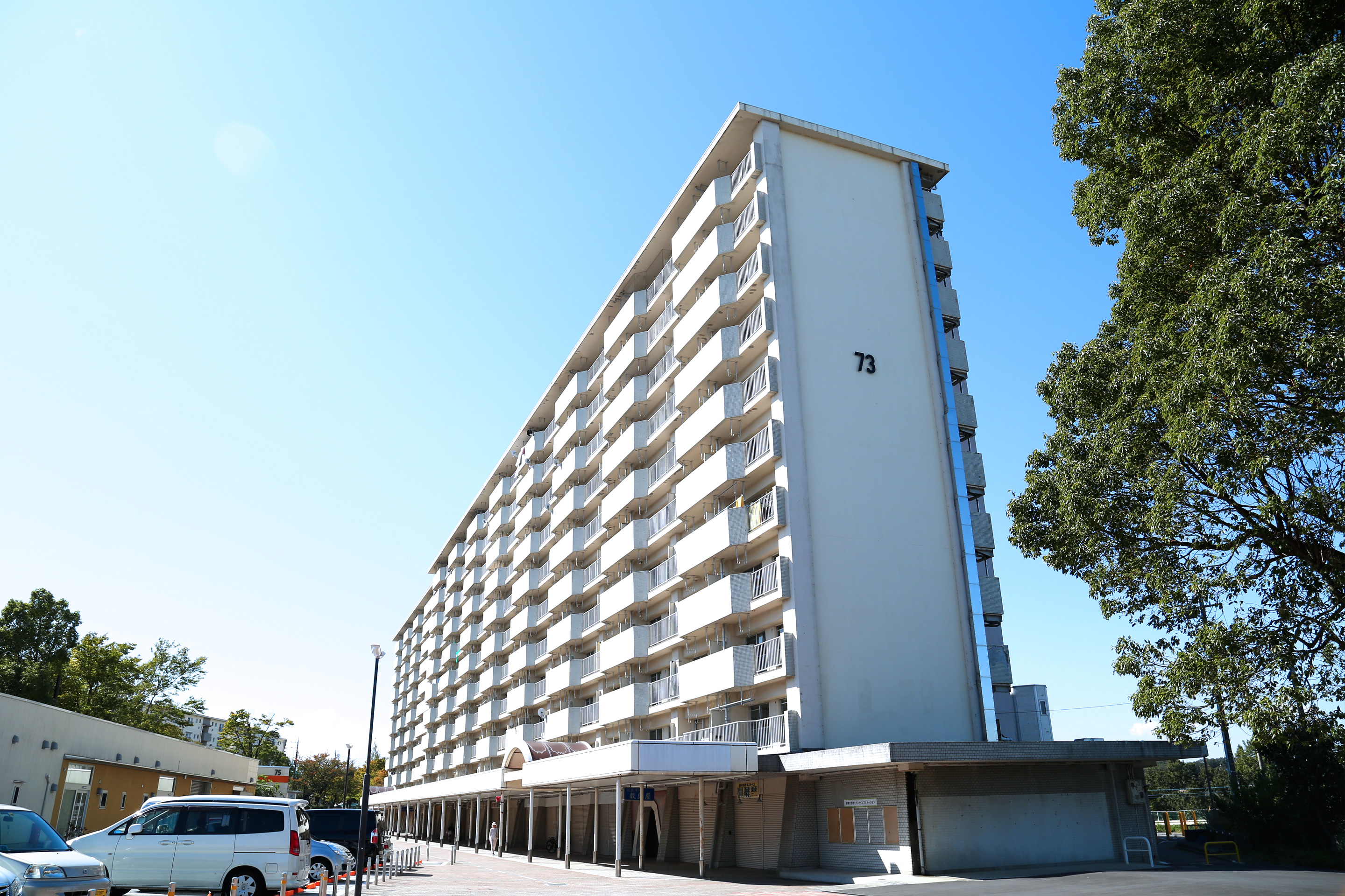 日野市程久保の高幡台団地73号棟。